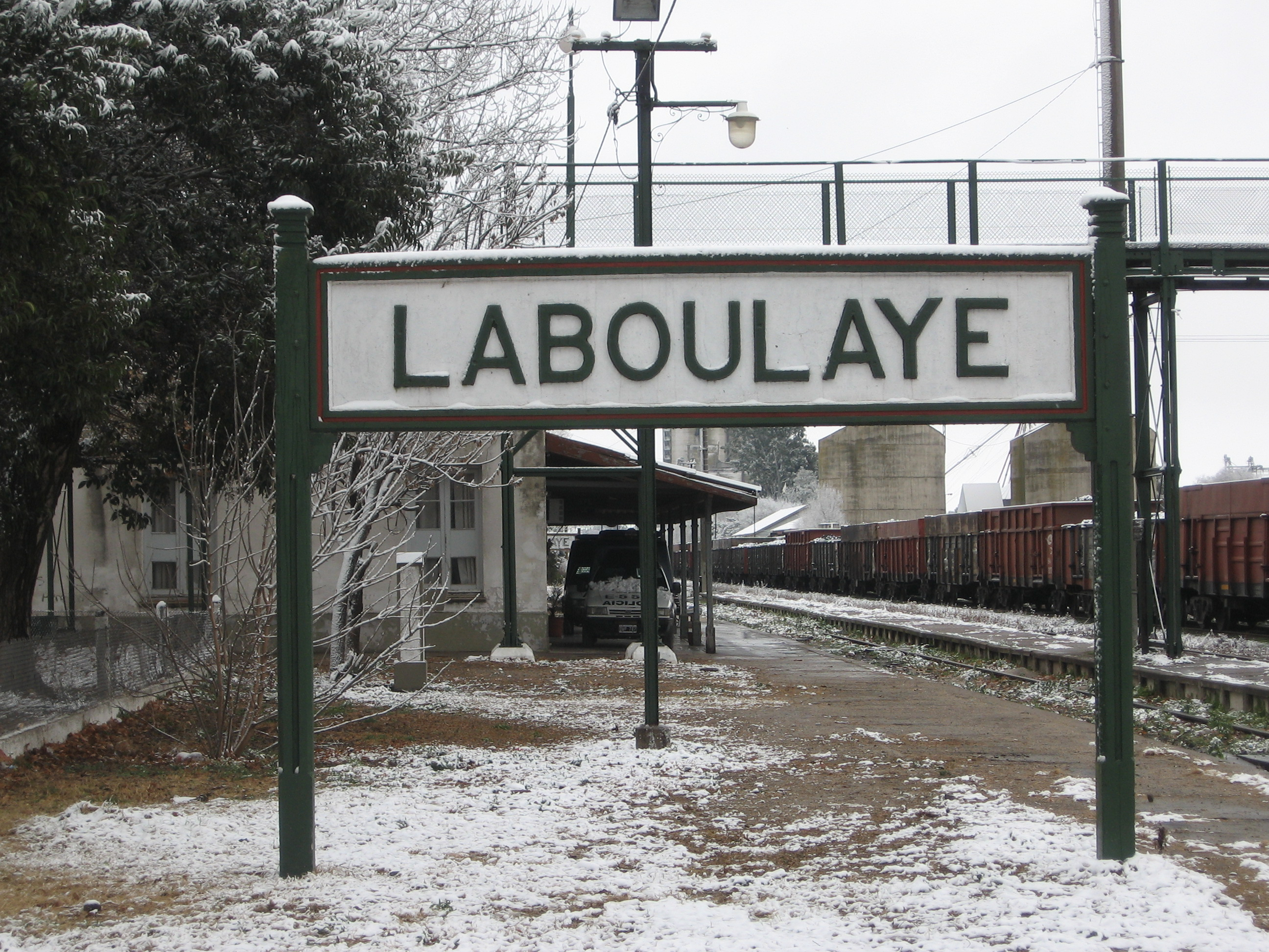 Estación de ferrocarril